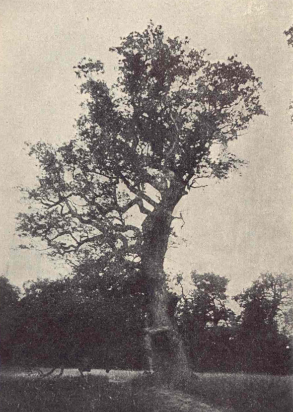 Dub v polesí Pohanská (Pohansko u Břeclavi)